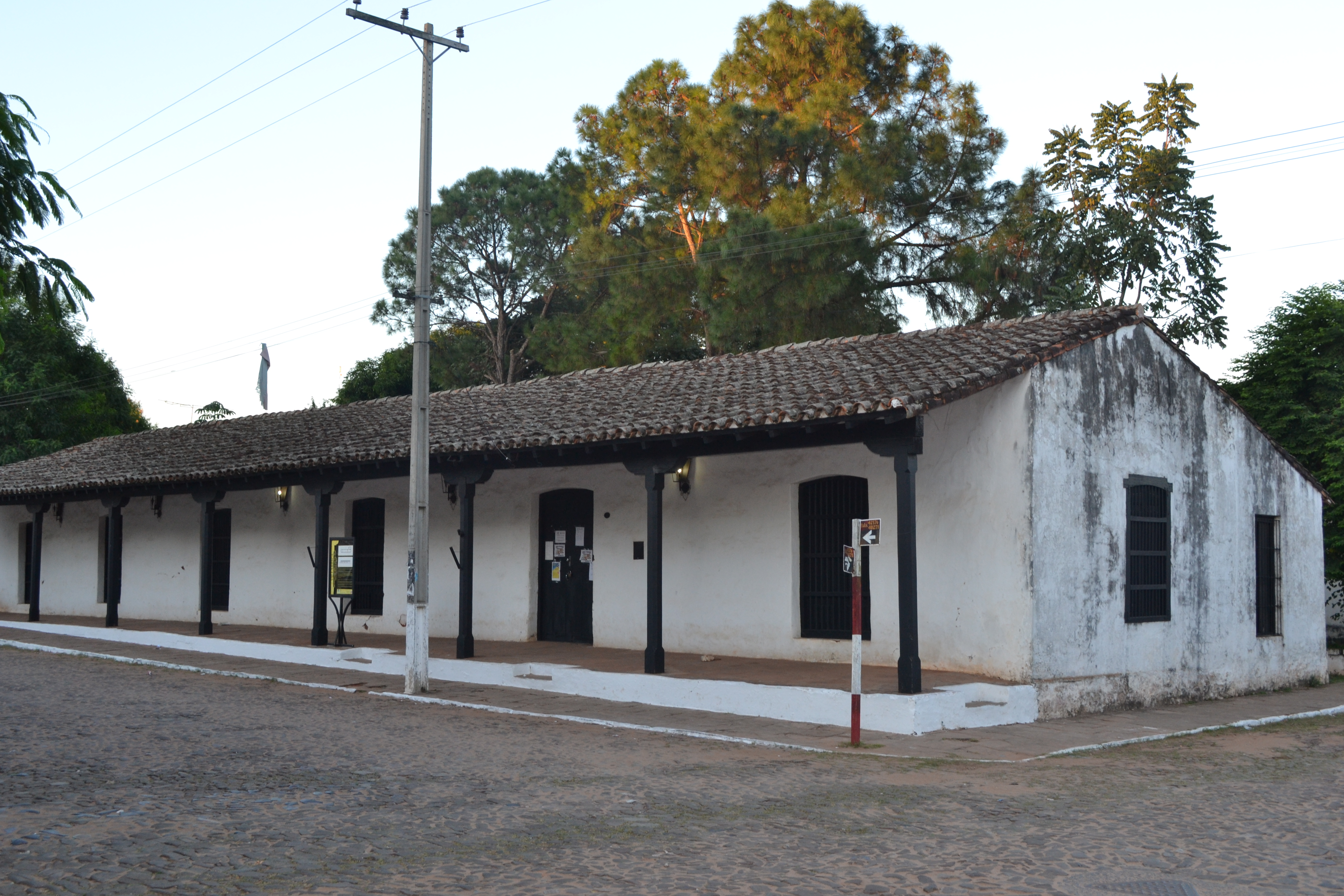 Museo Maestro Fermín López de Villarrica